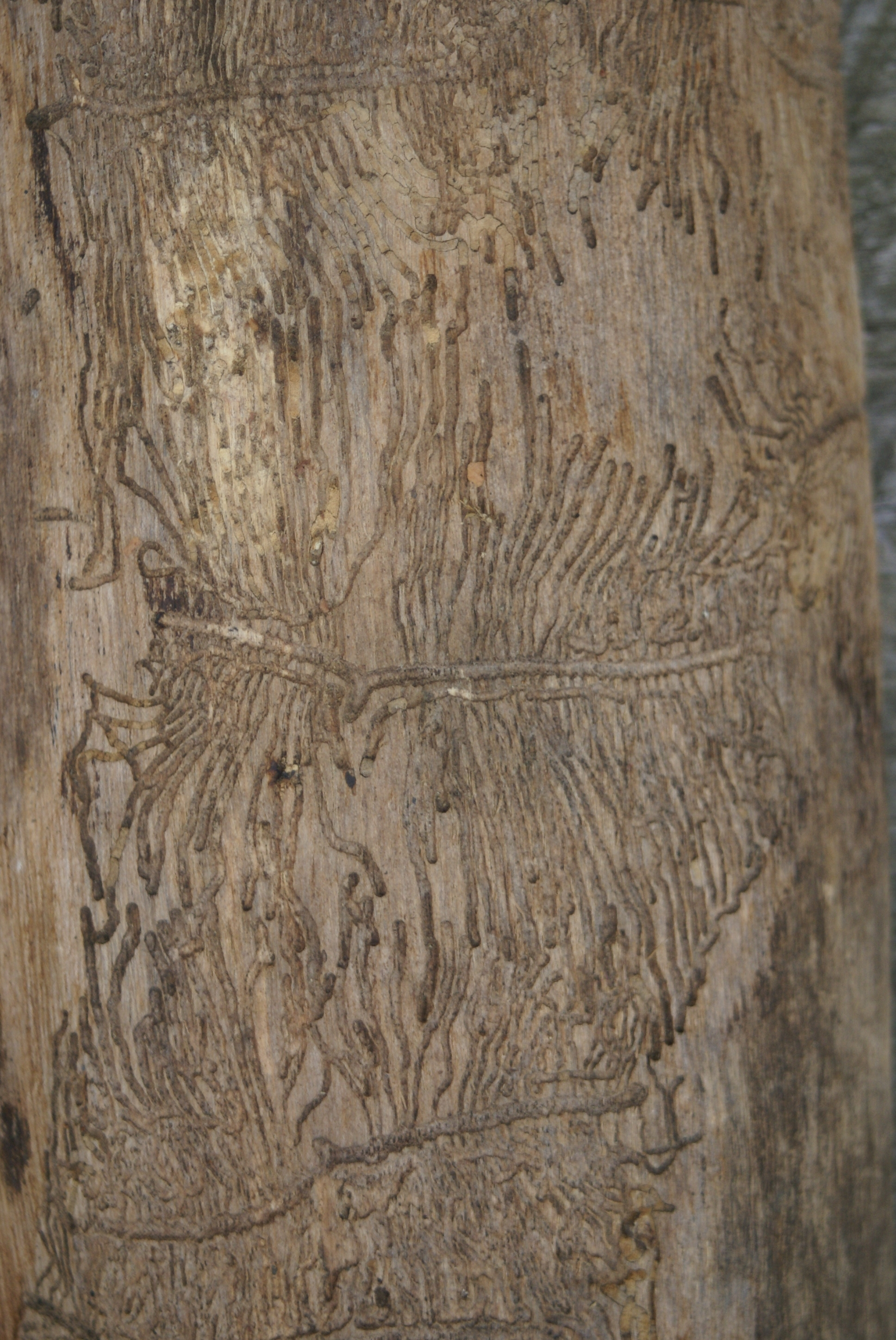 Leperisinus varius Fraßbild